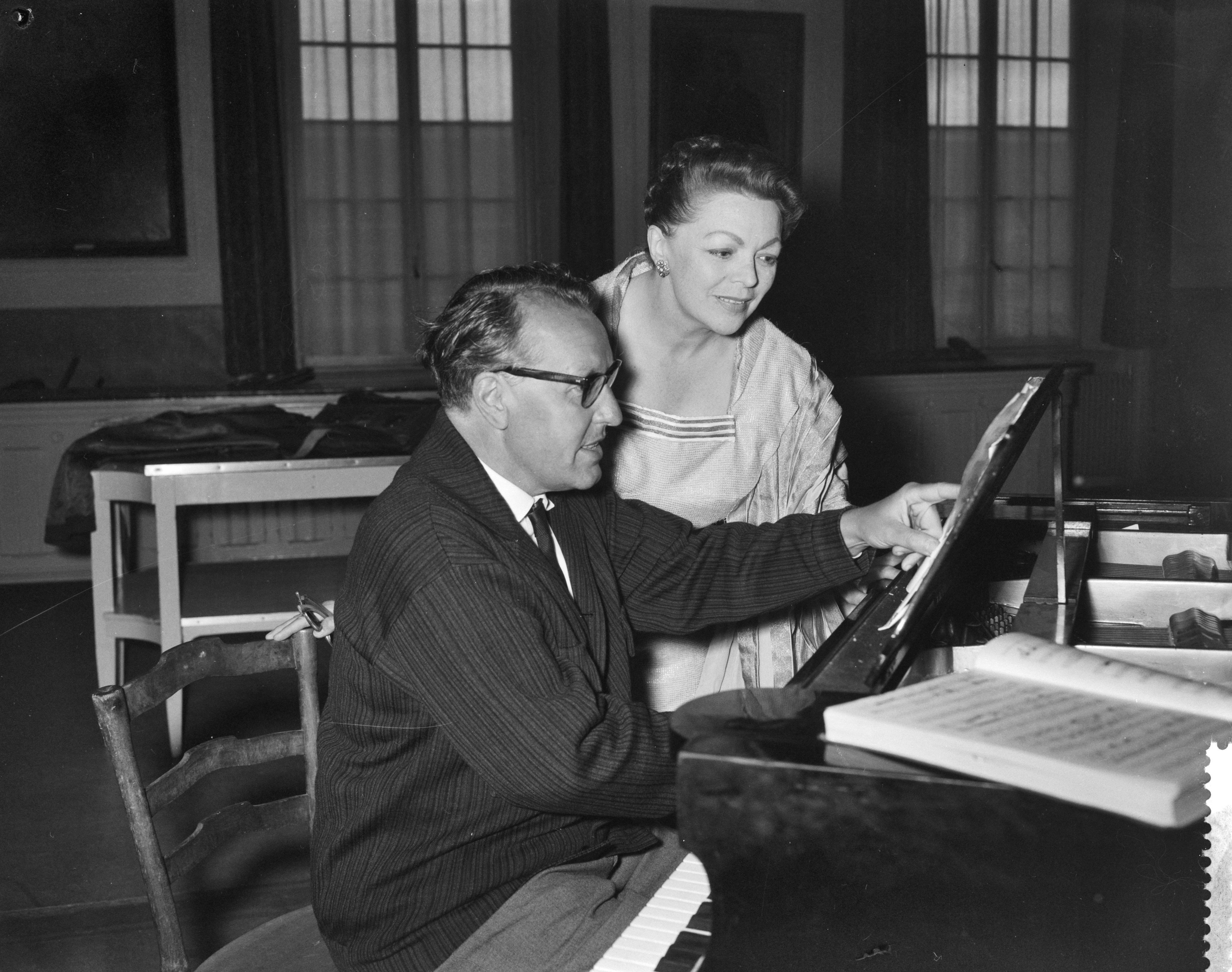 Collectie / Archief : Fotocollectie Anefo Reportage / Serie : [ onbekend ] Beschrijving : Voorbereidingen voor het Holland Festival Wieland Wagner en Martha Moval Datum : 10 juni 1959 Fotograaf : Bilsen, Joop van / Anefo Auteursrechthebbende : Nationaal Archief Materiaalsoort : Negatief (zwart/wit) Nummer archiefinventaris : bekijk toegang 2.24.01.04 Bestanddeelnummer : 910-4331